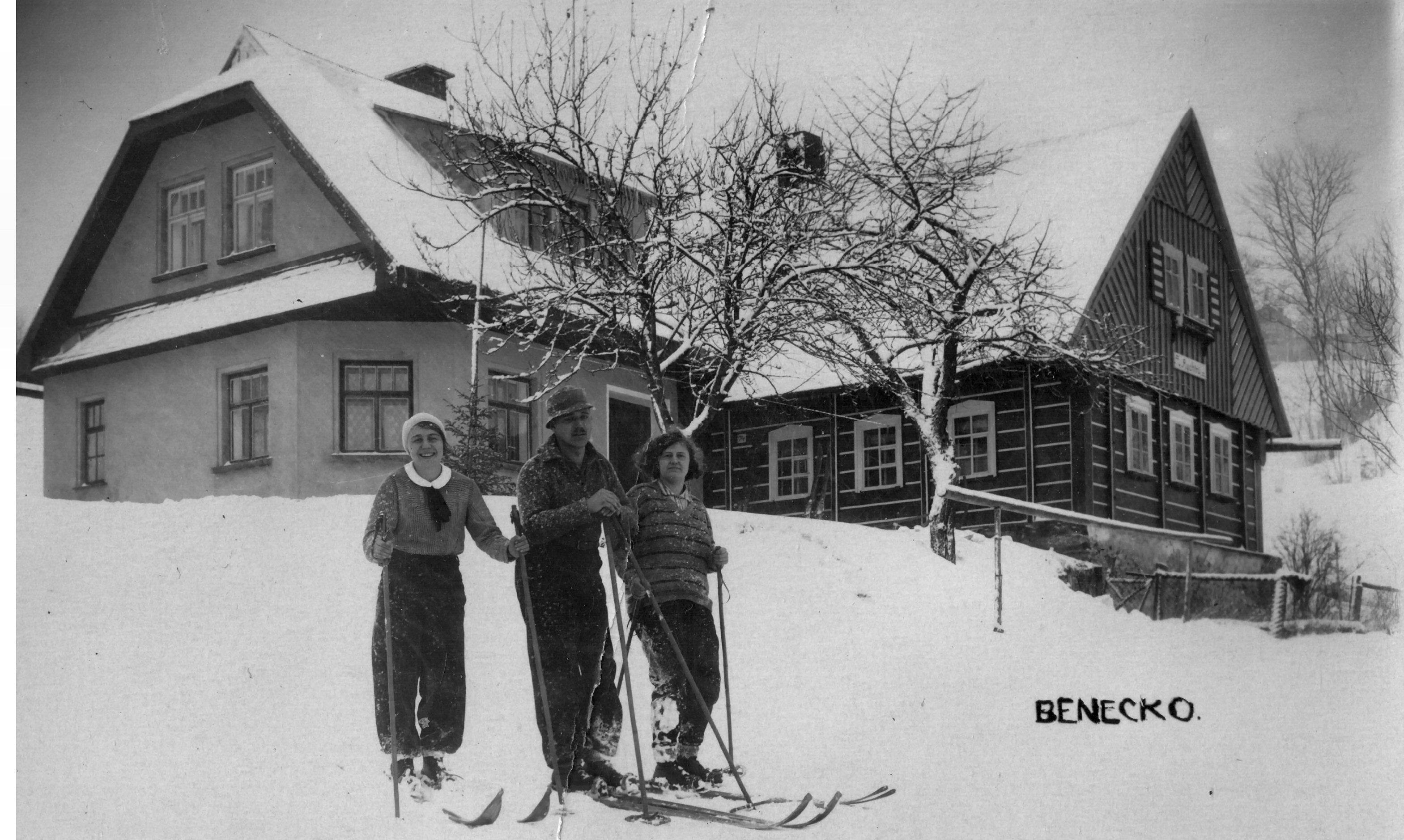 Fotografie, kterou dostávali hosté Rychtrovy boudy jako upomínku na rekreaci z roku 1928. Ukazuje dům po dokončené první fázi přestavby, s přistavěným novým křídlem a půdní vestavbou, ještě ale s původní strmou střechou.